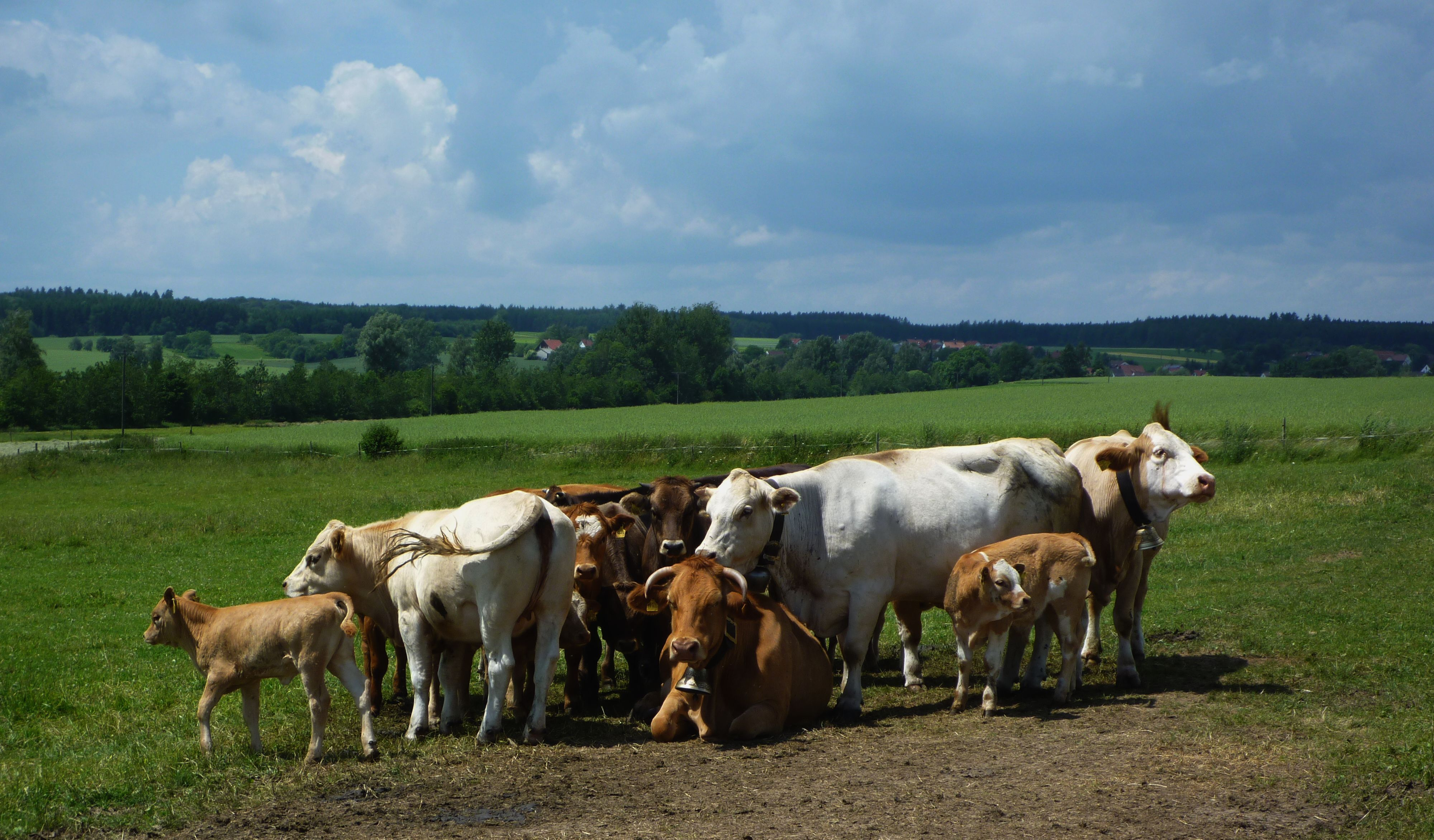 Moosburg - Rinderherde, dicht gedrängt